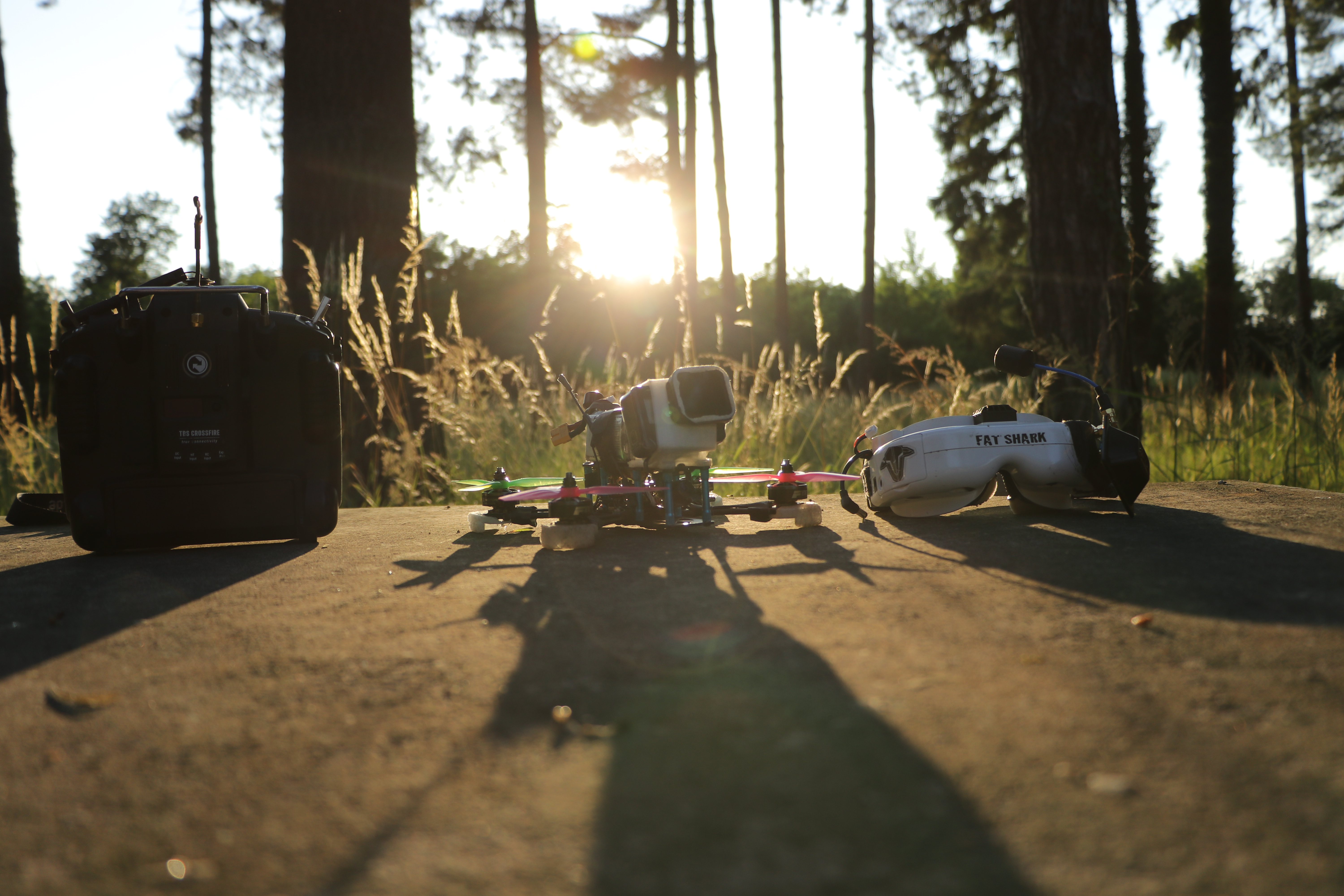 Radio oddajnik, dron in očala (FPV)